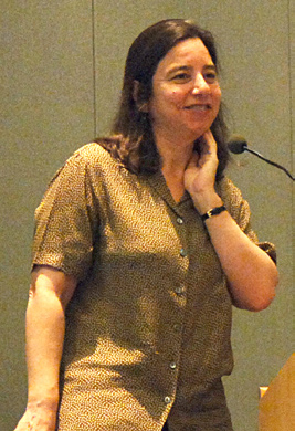 Foto da escritora norte-americana Sarah Schulman